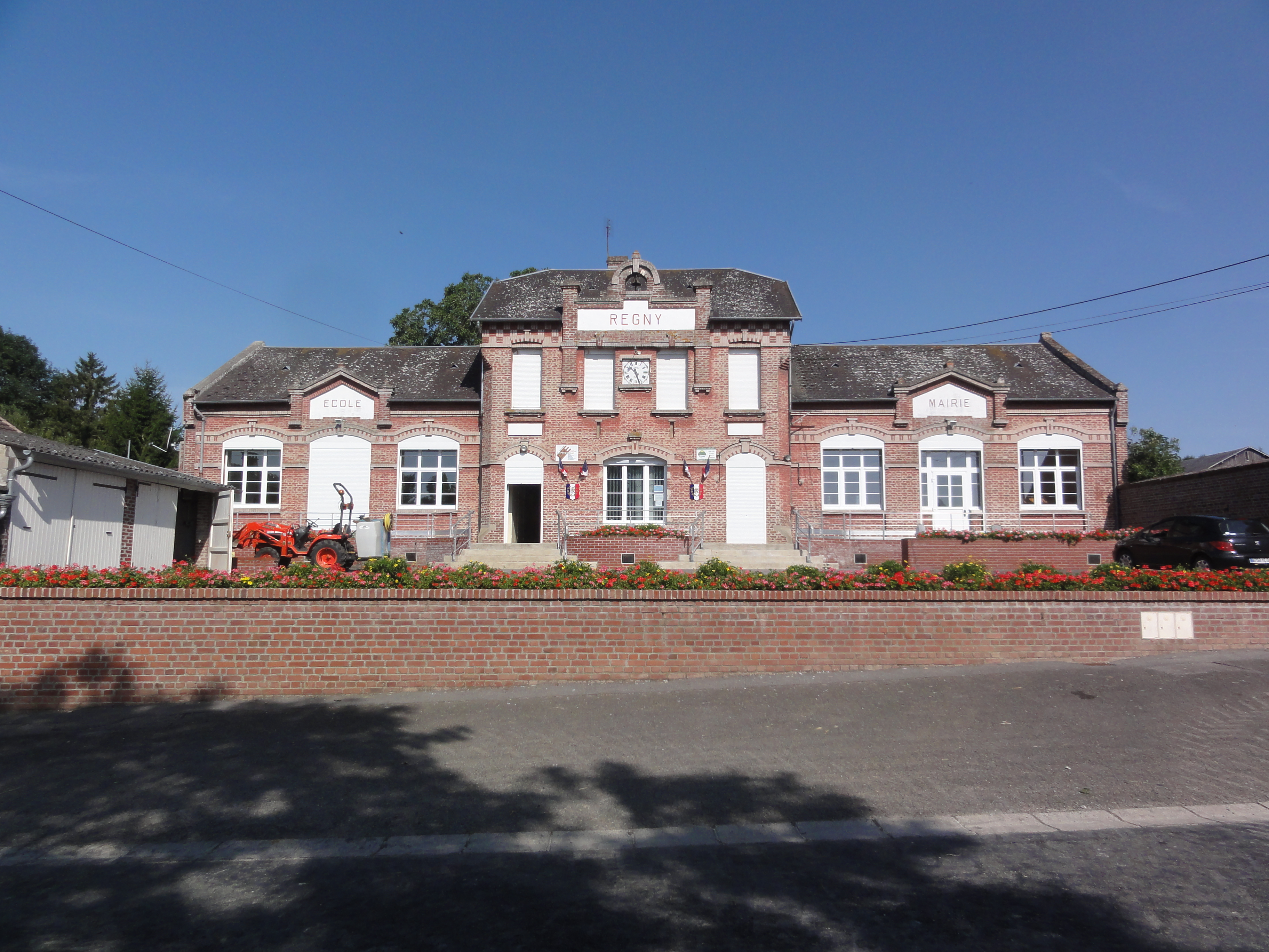 Regny (Aisne) mairie et école